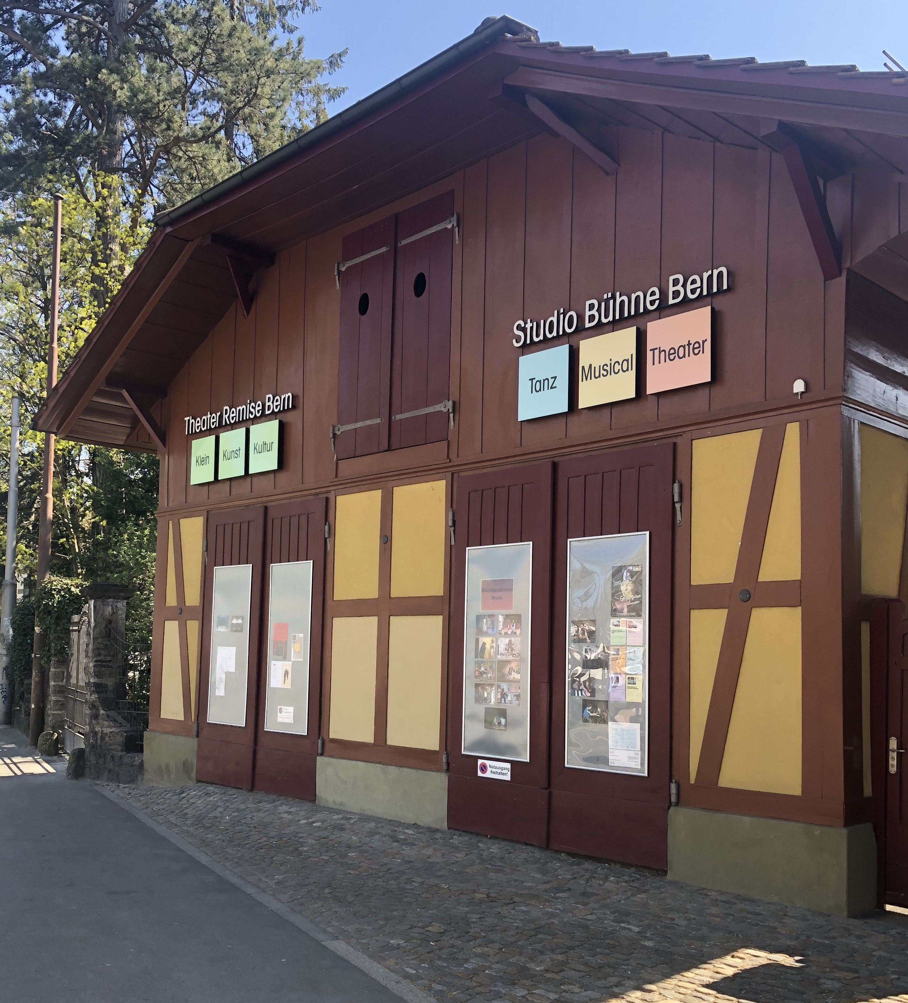 Villette Theater Remise